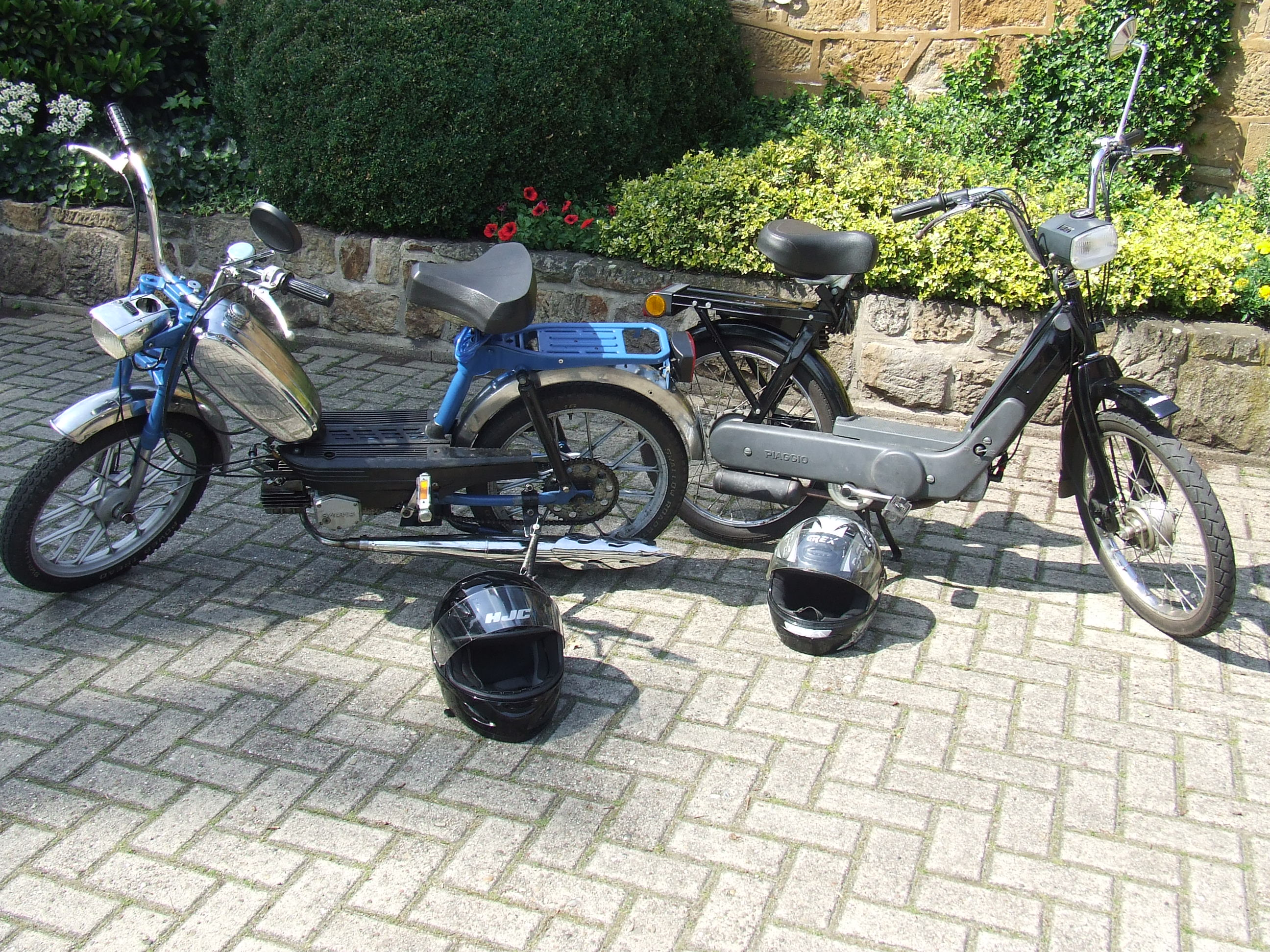 Mofas Piaggio Ciao und Hercules Prima 5